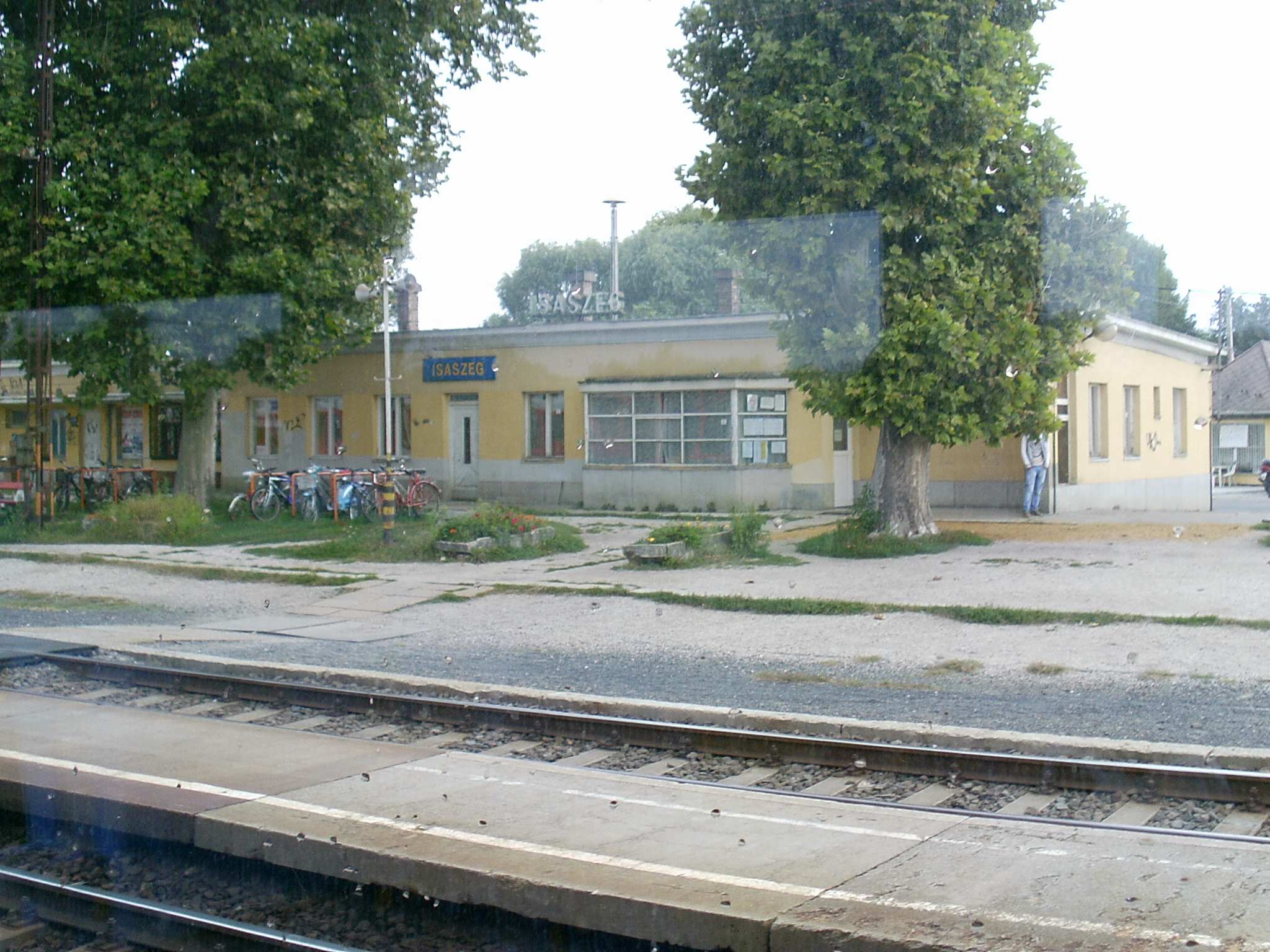 Isaszeg vasútállomás a vonatból